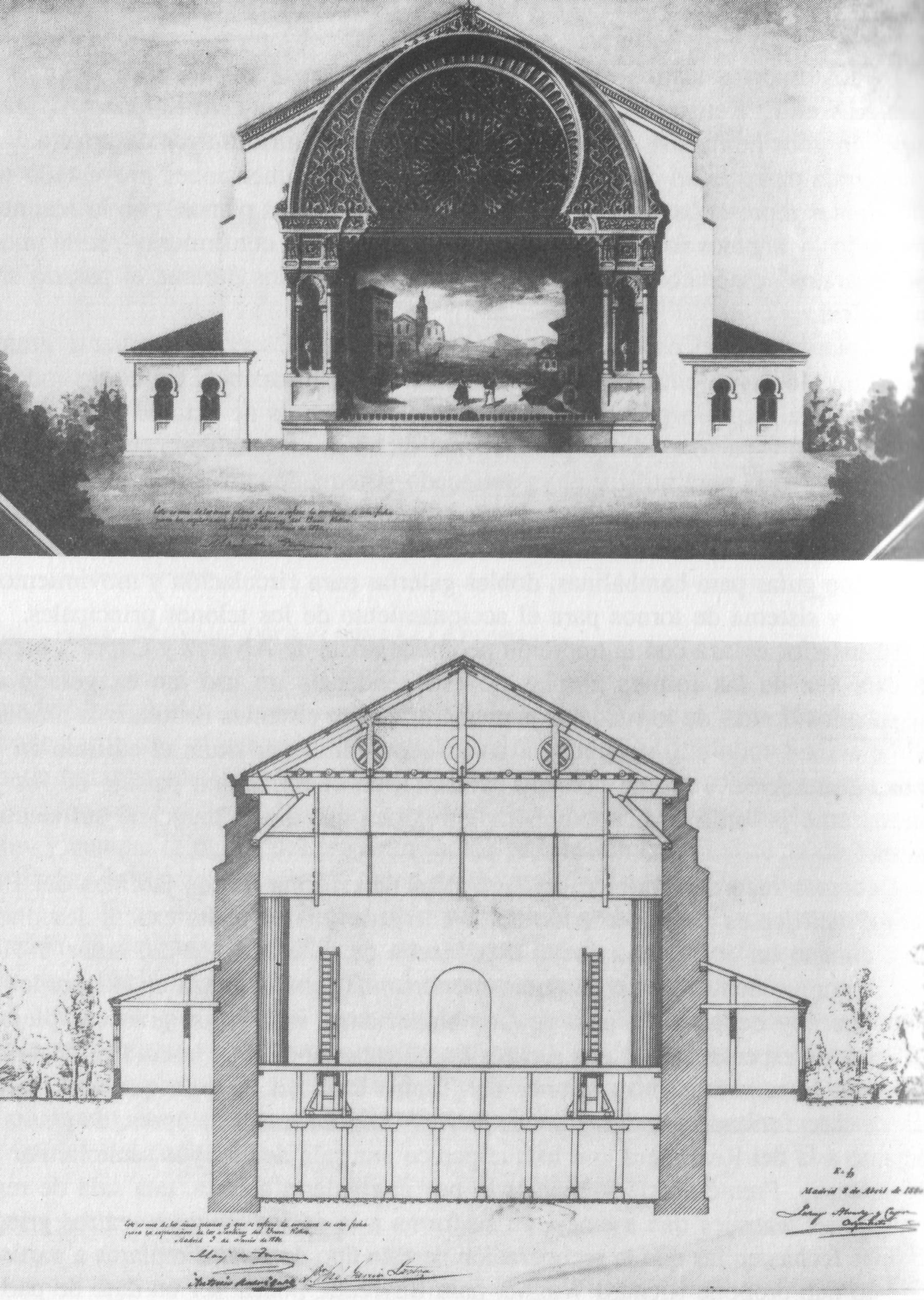 Proyecto de construcción del Teatro de los Jardines del Buen Retiro de Madrid. Museo Municipal de Madrid.